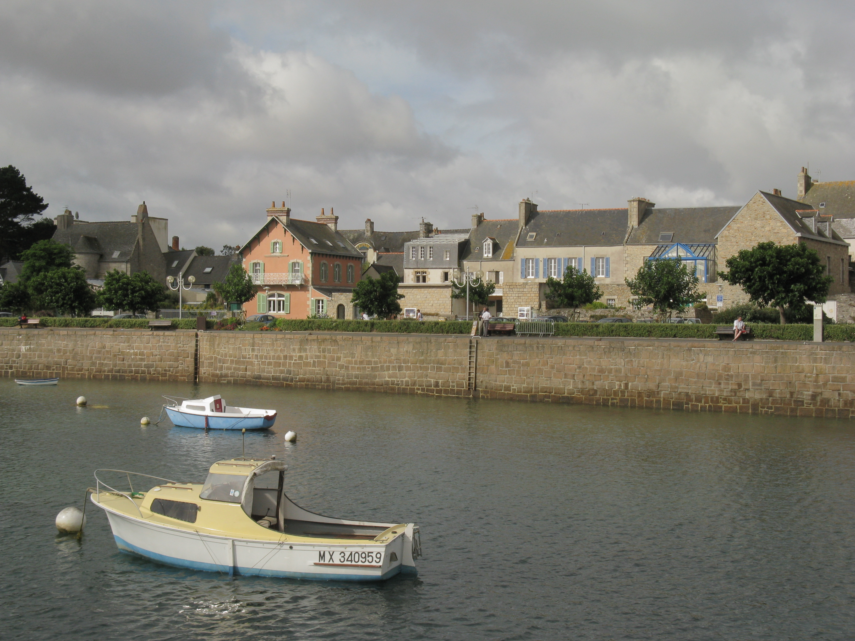 Oude haven van Roscoff, Bretagne